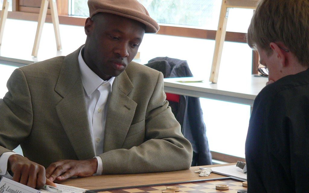 Leopold Sekongo tegen Johan Sterrenburg op het NK dammen 2006 (uitslag 1-1)